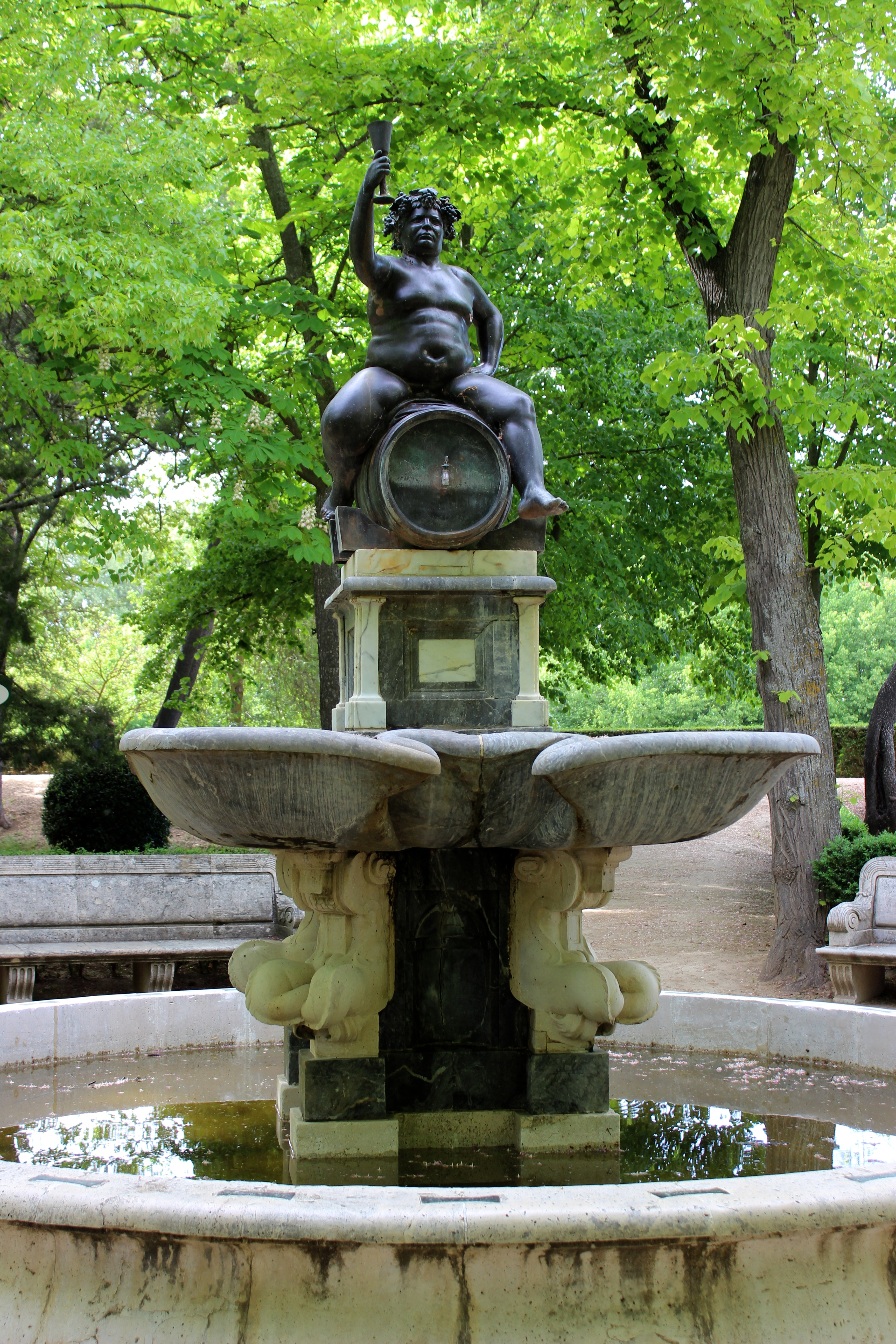 Aranjuez. Jardín de la Isla, fuente de Baco.